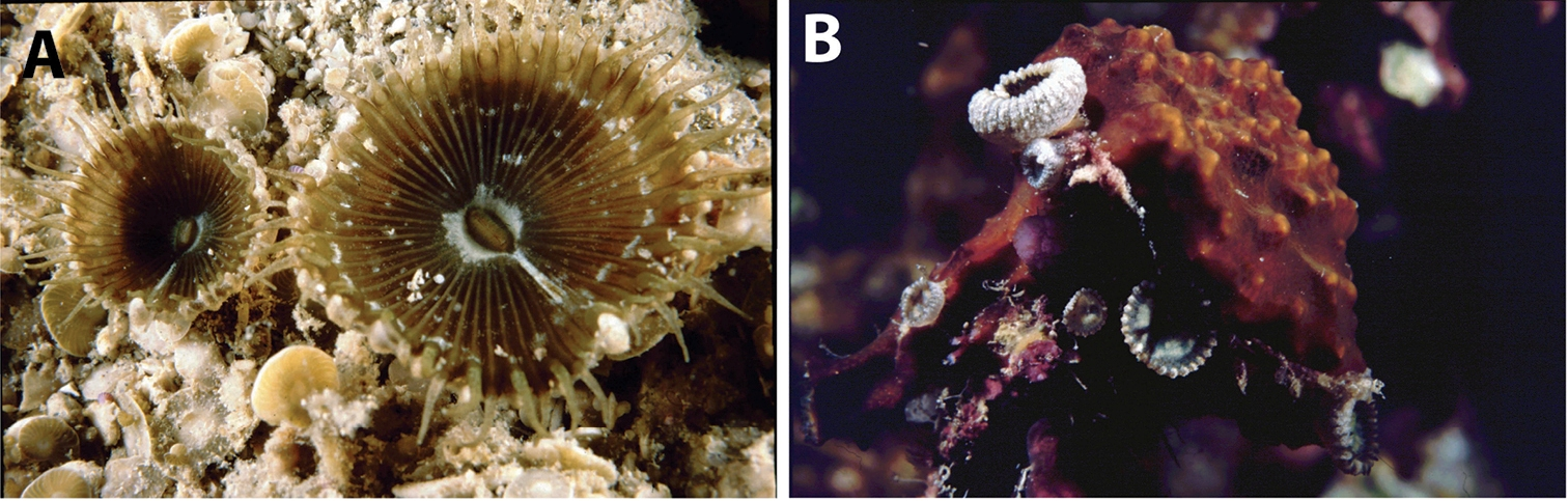 A Palythoa cf. mutuki en Pulau Bone Batang, Sulawesi sur, Archipélago Spermonde, 1997 B P. cf. mutuki en costa principal, Bali oeste,1998